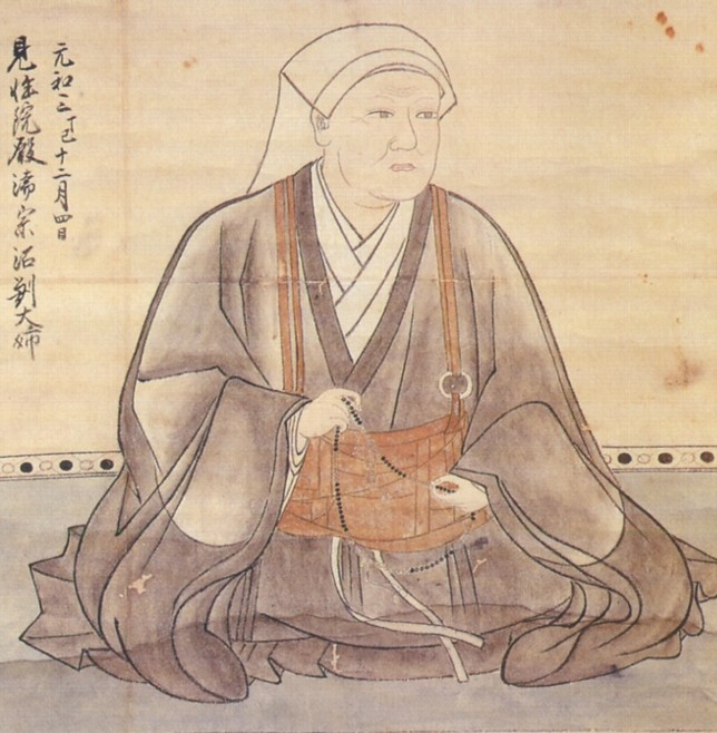 見性院。Kensyoin.山内一豊の妻。